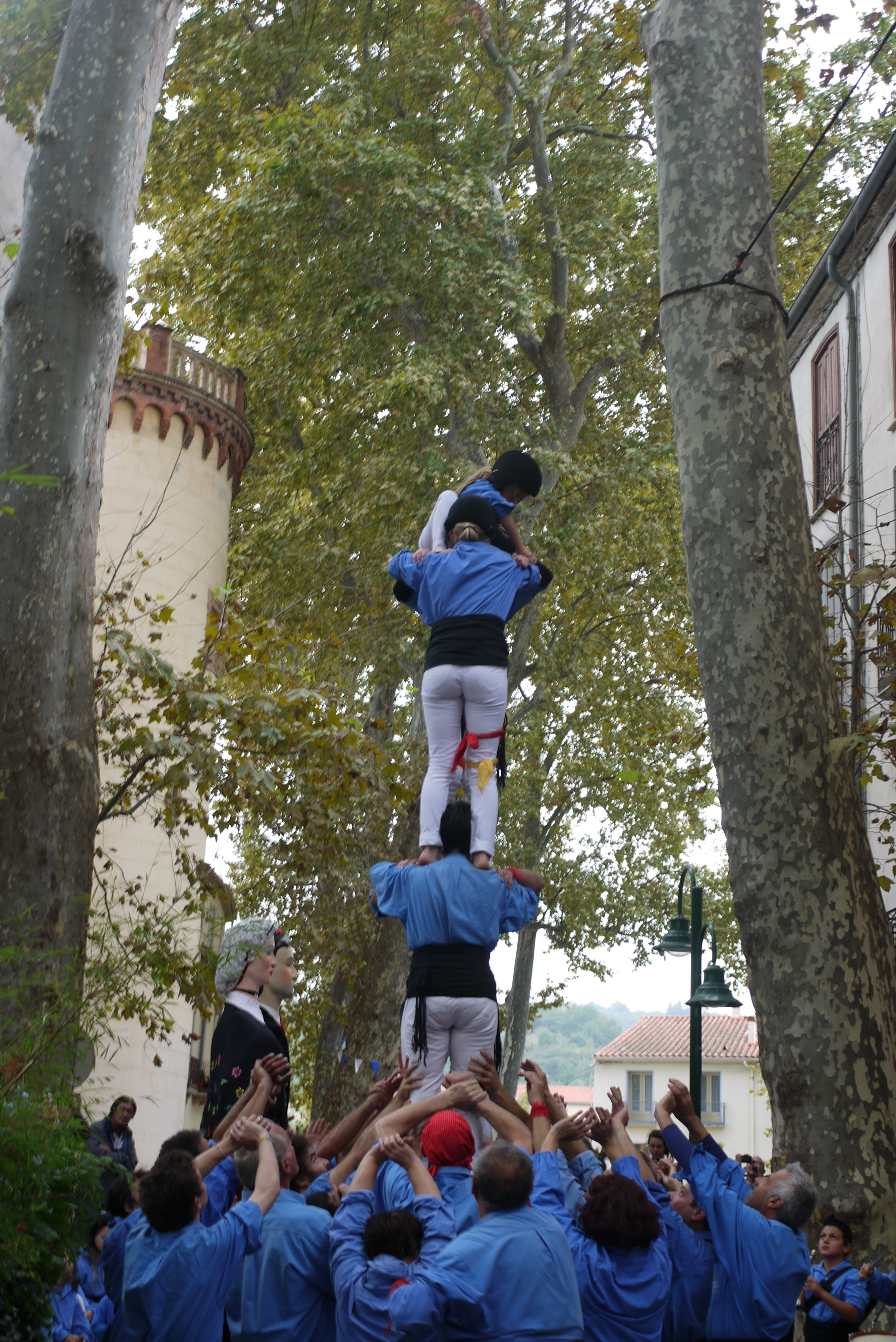 Castell des Angelets del Vallespir à Céret